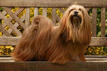 Trinity De Koempfer